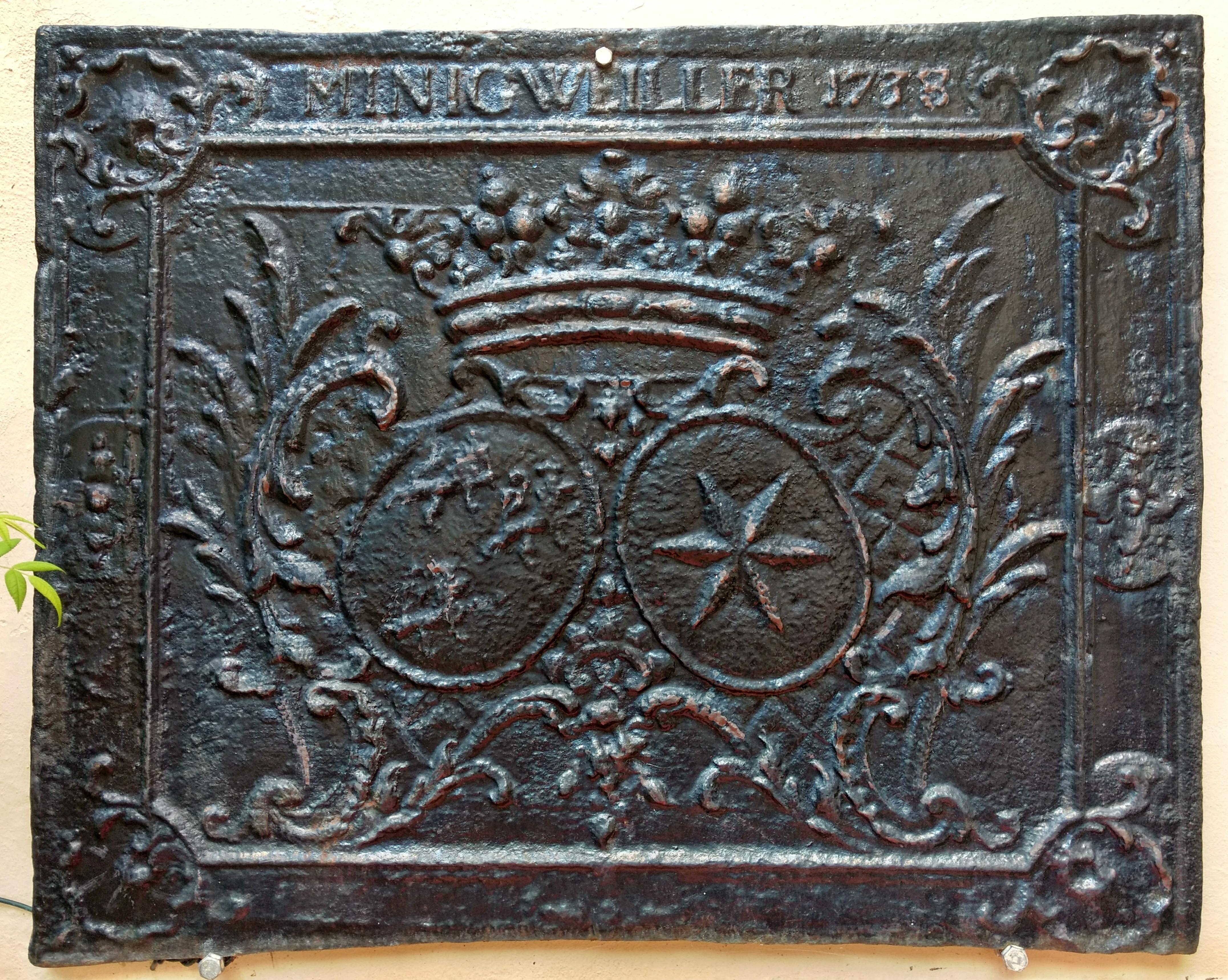 Takenplatte Münchweiler früher Minigweiler oder Minigweiller